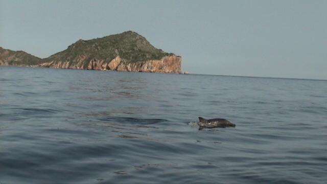 entre los estados Sucre y Anzoategui al oriente del pais